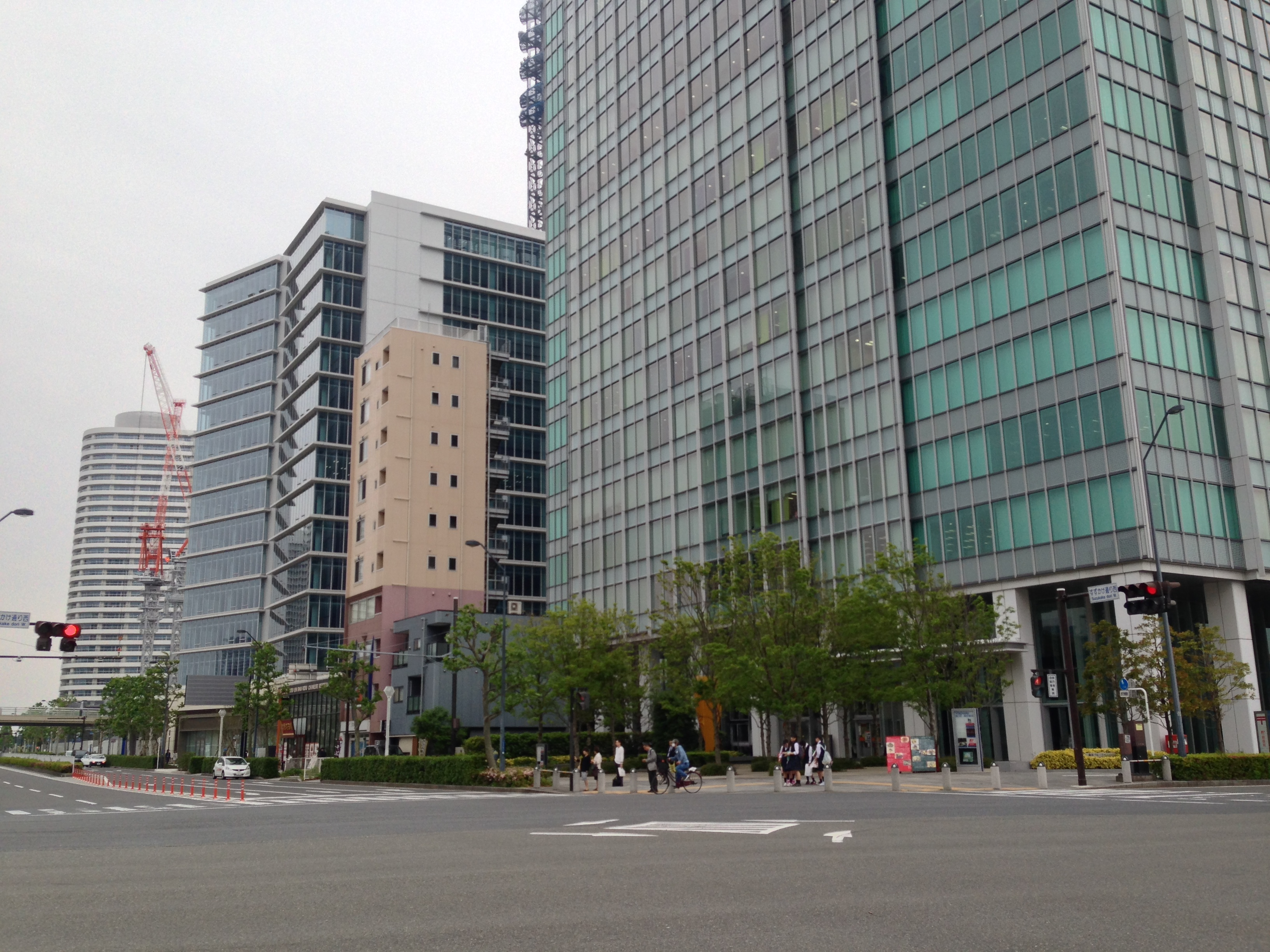 みなとみらい地区のすずかけ通り沿い、オフィスビル「横浜ブルーアベニュー」の隣にはペンシルビル（小規模ビル）が建つ。